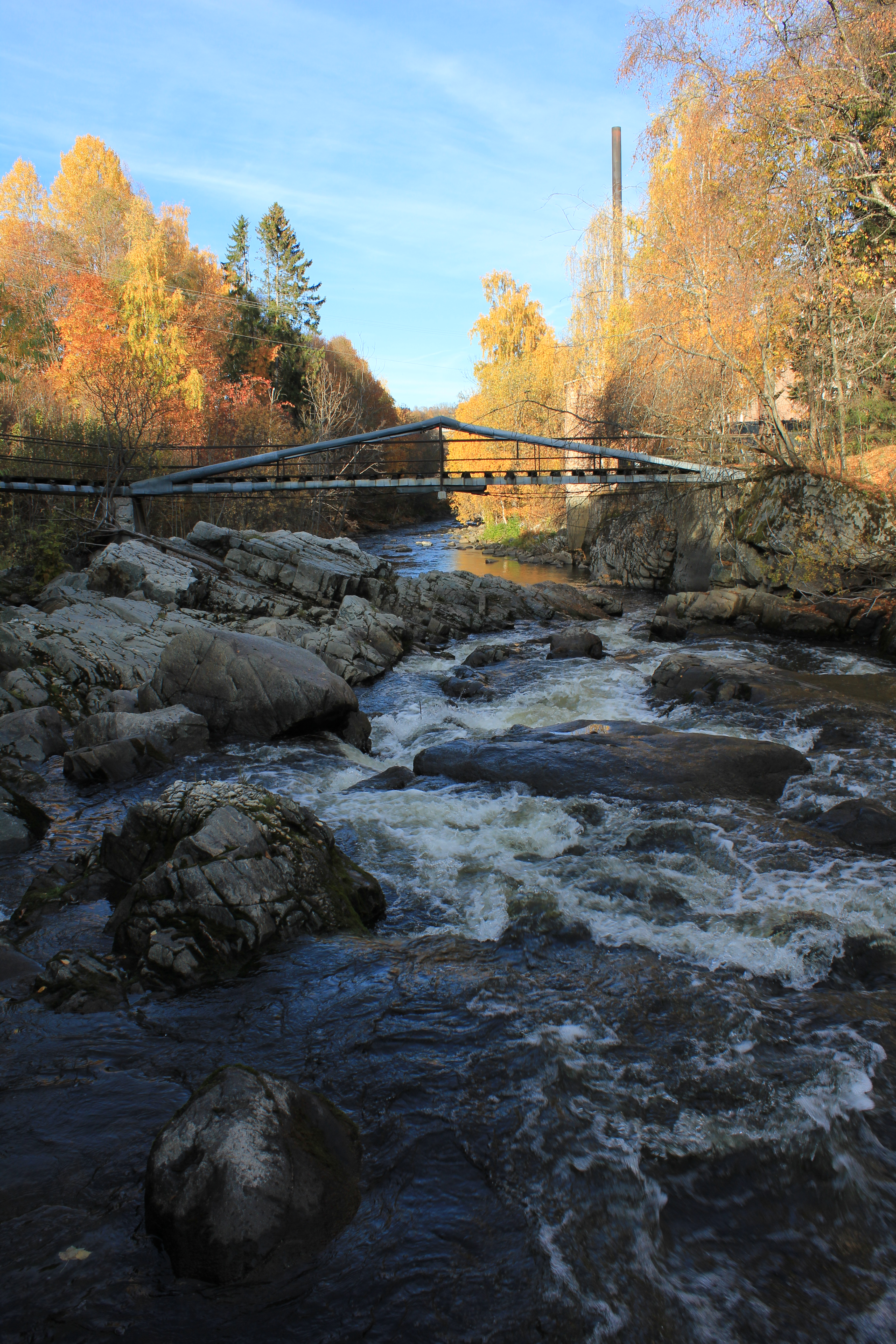 Lenaelva passerer Landheim på Skreia.